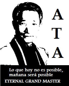 EGM-ATA